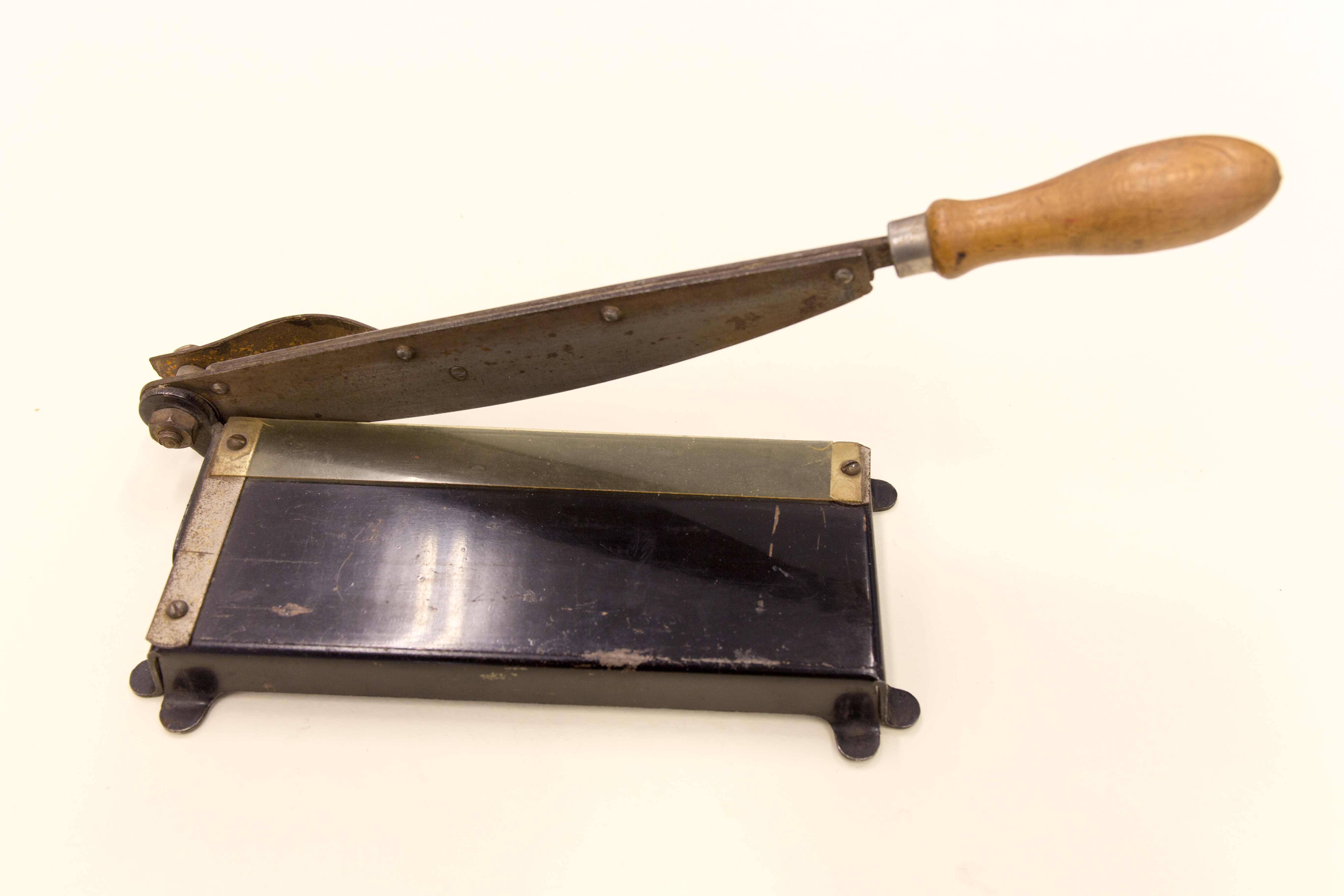 Papierschneidemaschine Indetifikations-Nr.: N (9 A 79) 217/1992 Herkunftsort: Berlin Höhe x Breite x Tiefe: 3 x 28 x 9 cm Ausgabe: Eisen, gestanzt, Eisenblech, Holzgriff, Kunststoffschiene Zustand: gebraucht Beschreibung: Einfaches, schwarzlackiertes Metallpodest mit angeschraubtem Fallmesser (brauner Holzgriff). Keine Herstellerangaben auf dem Gerät.